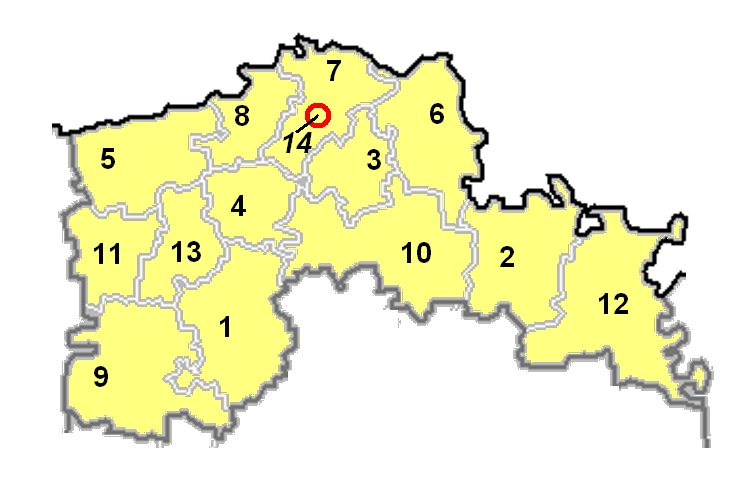 Карта административного деления Северо-Казахстанской области